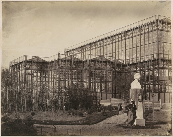 Außenansicht des Münchner Glaspalastes